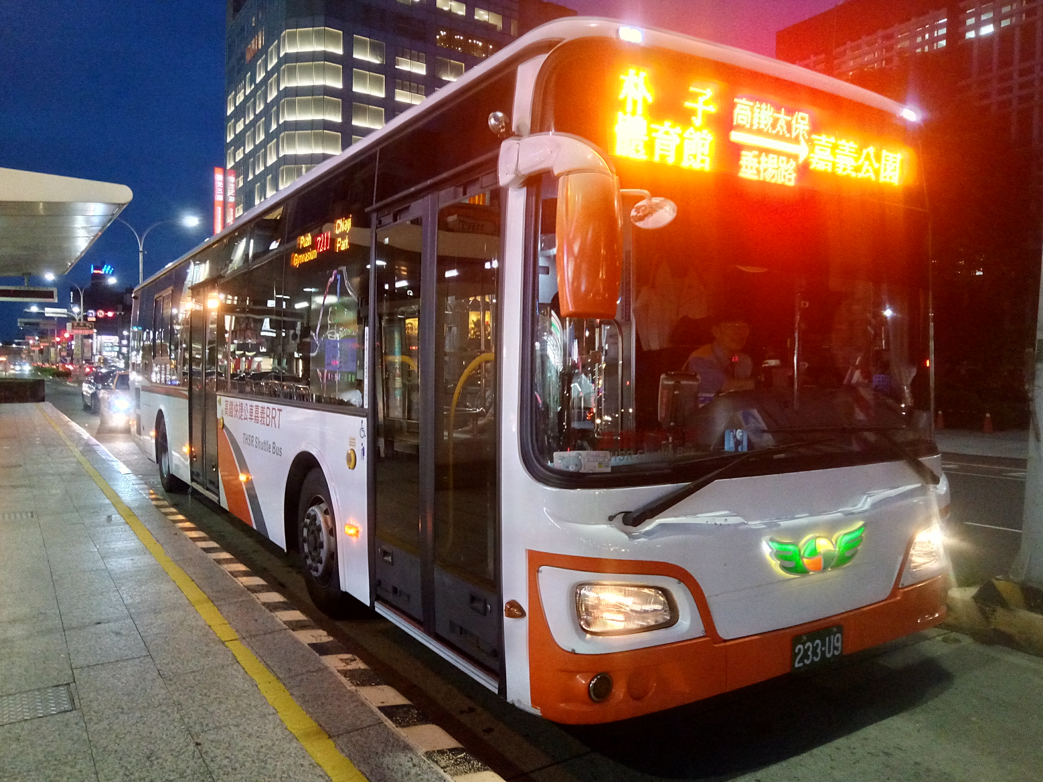 嘉義BRT車両233-U9(新光三越遠東駅にて)